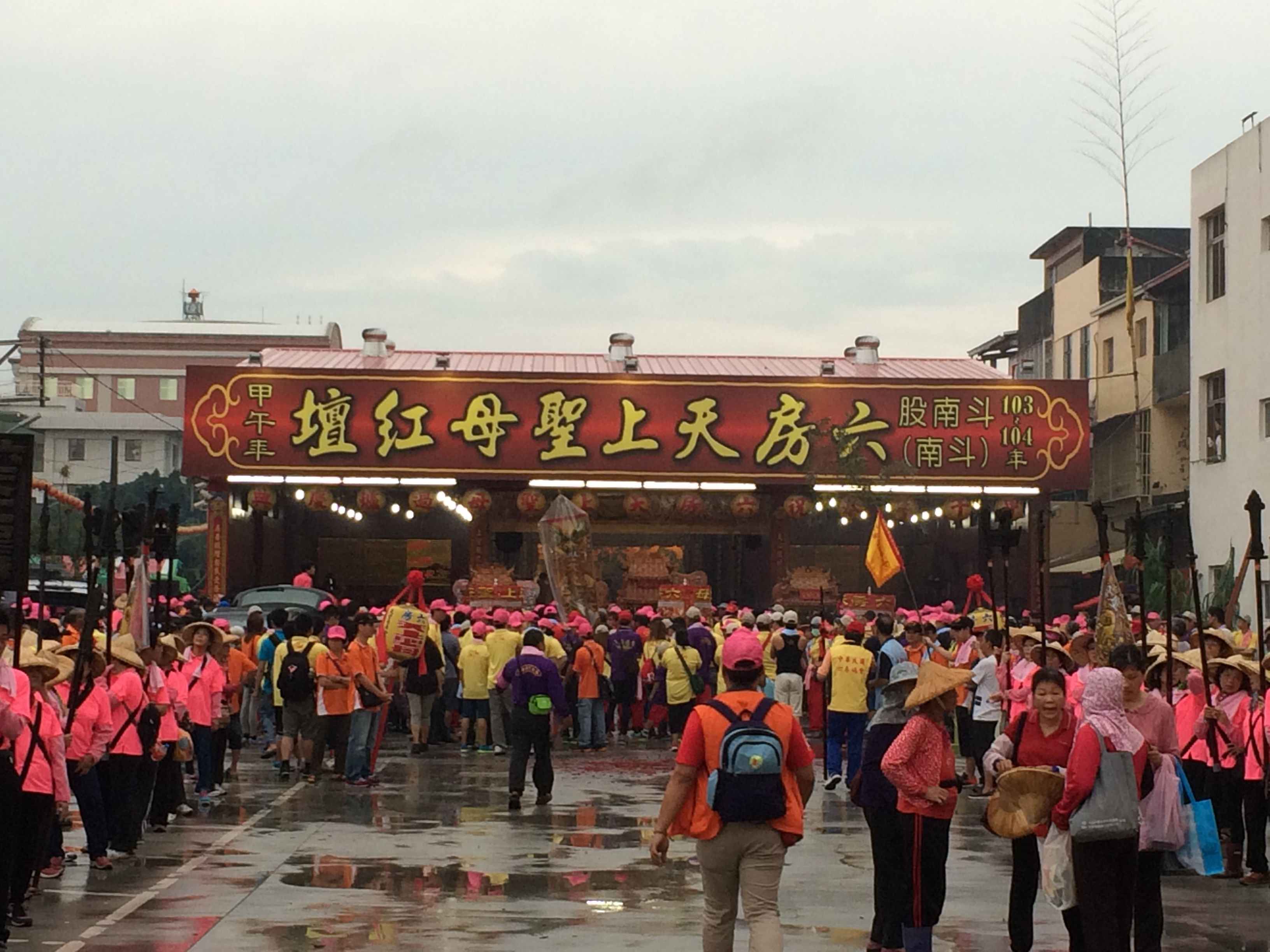 104年-歲次乙未年六房天上聖母過爐,斗南股斗南至土庫股竹腳寮